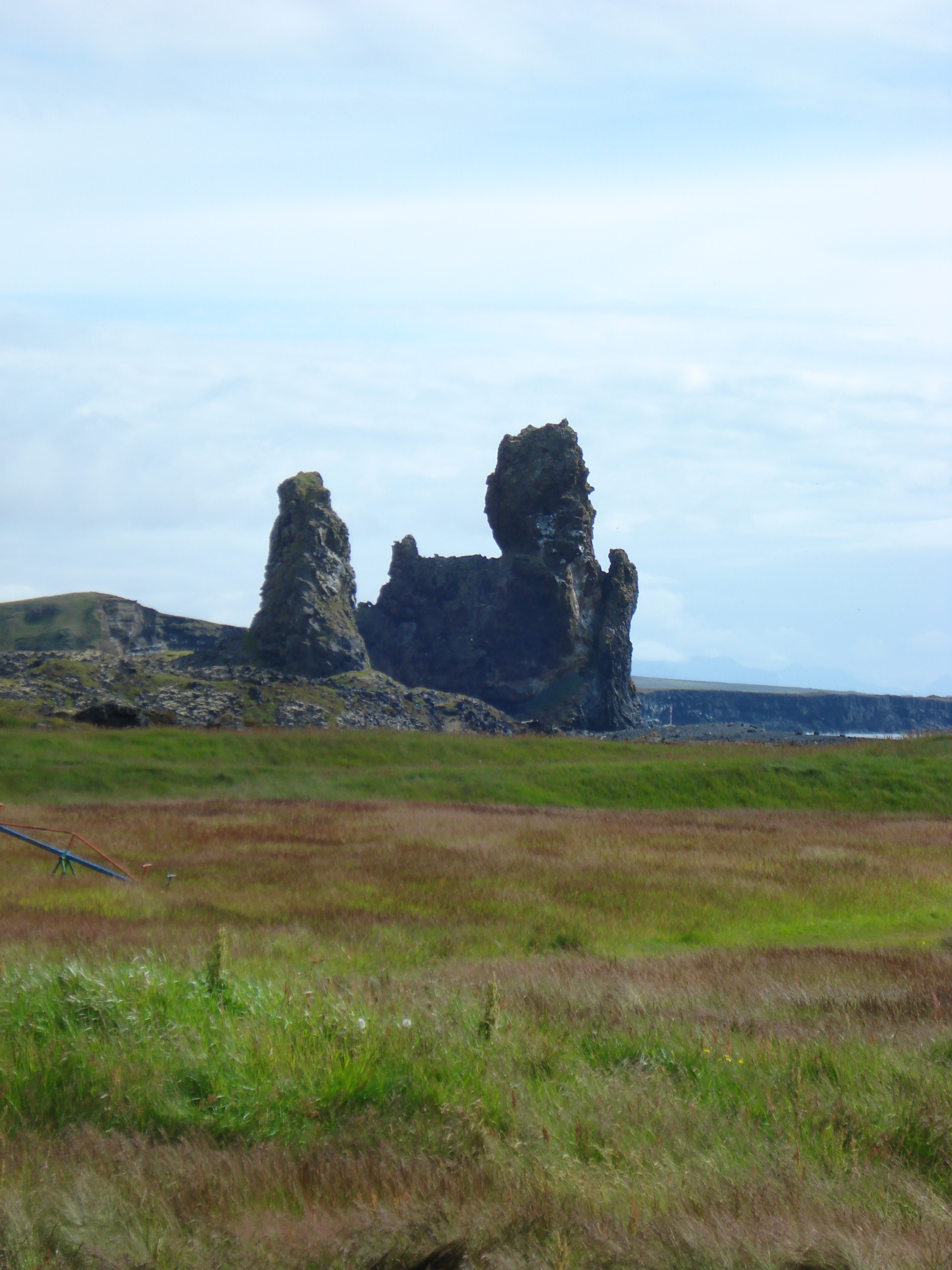 Malarrif, Snæfellsnes, Iceland